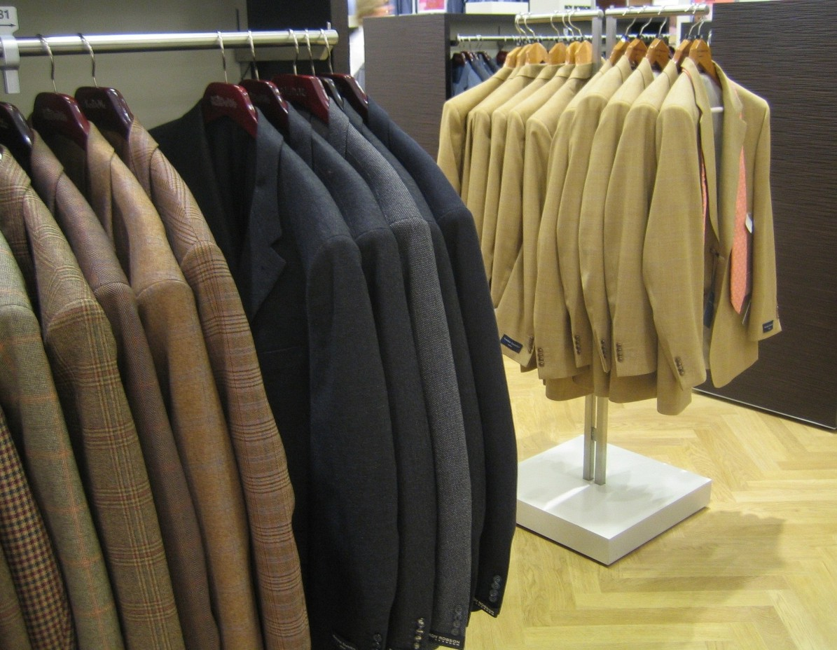 Konfektionskleidung. Herrenjacken.